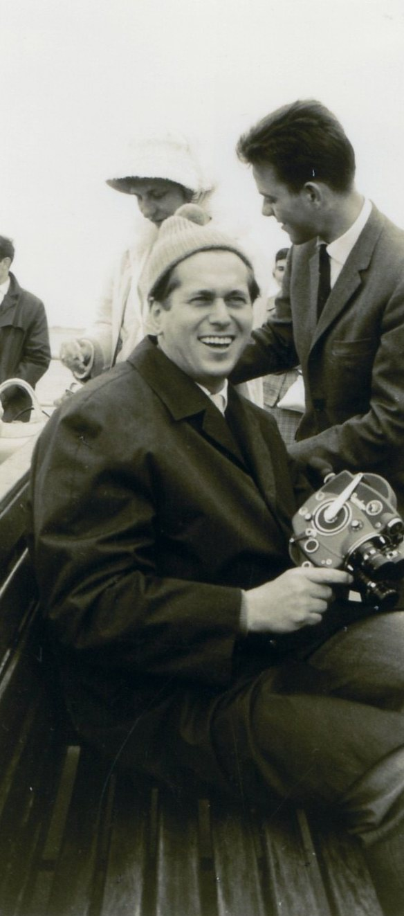 Der Schwiegersohn von Carl Wöltje wird geschäftsführender Gesellschafter